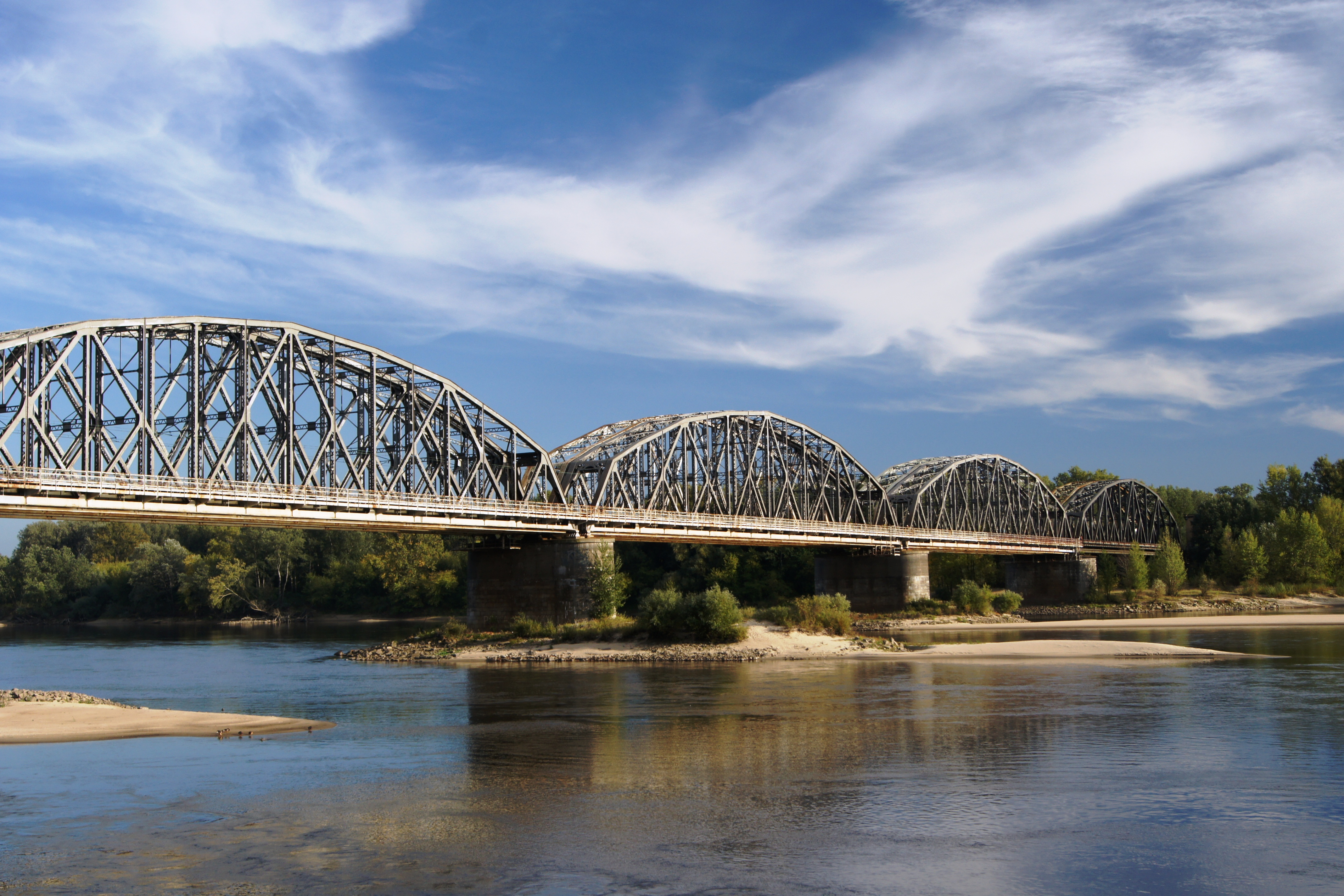 most kolejowy im. Ernesta Malinowskiego przez Wisłę w Toruniu, rok ukończenia budowy: 1873